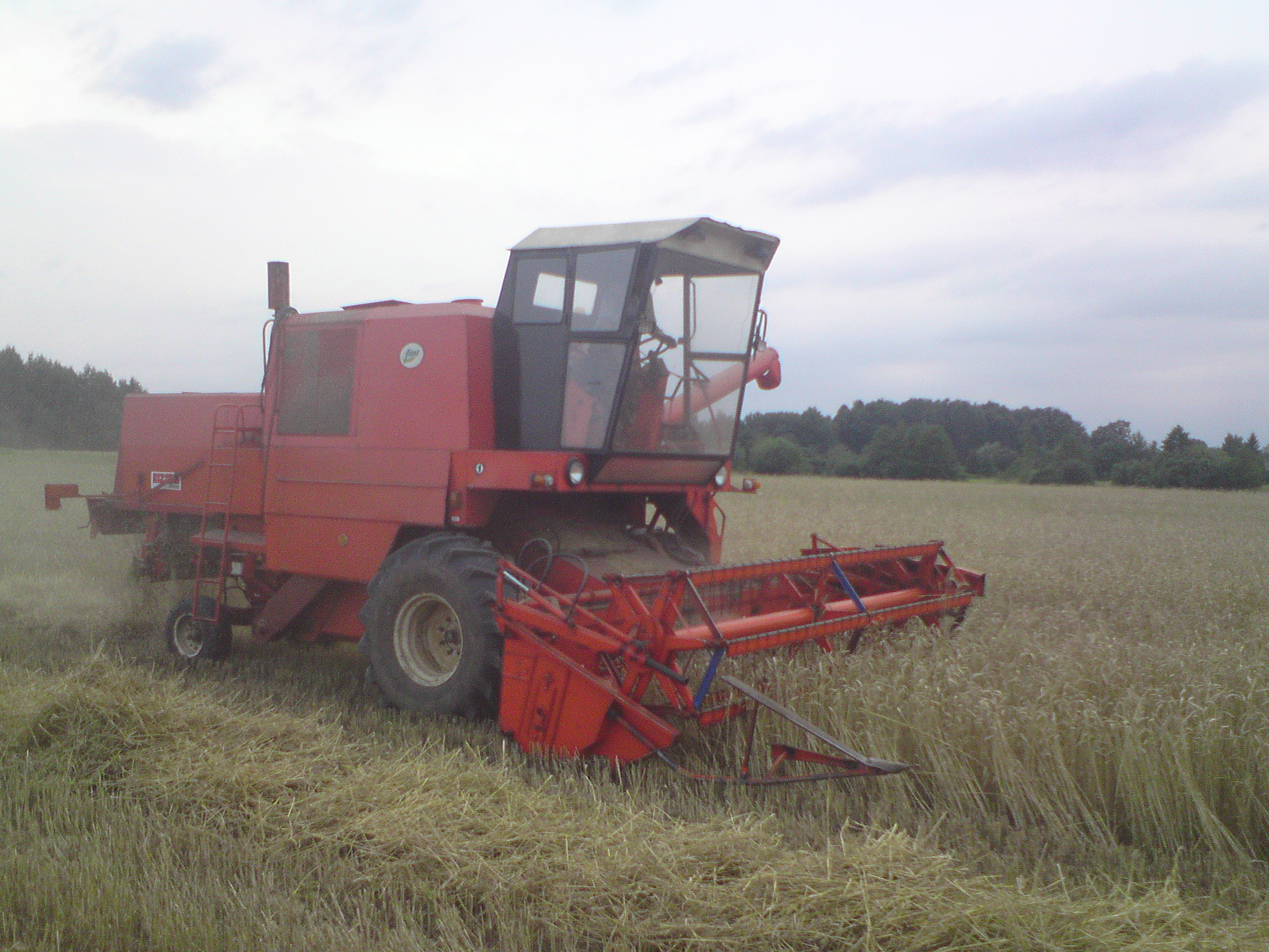 Bizon Super Z056 z 1989r.